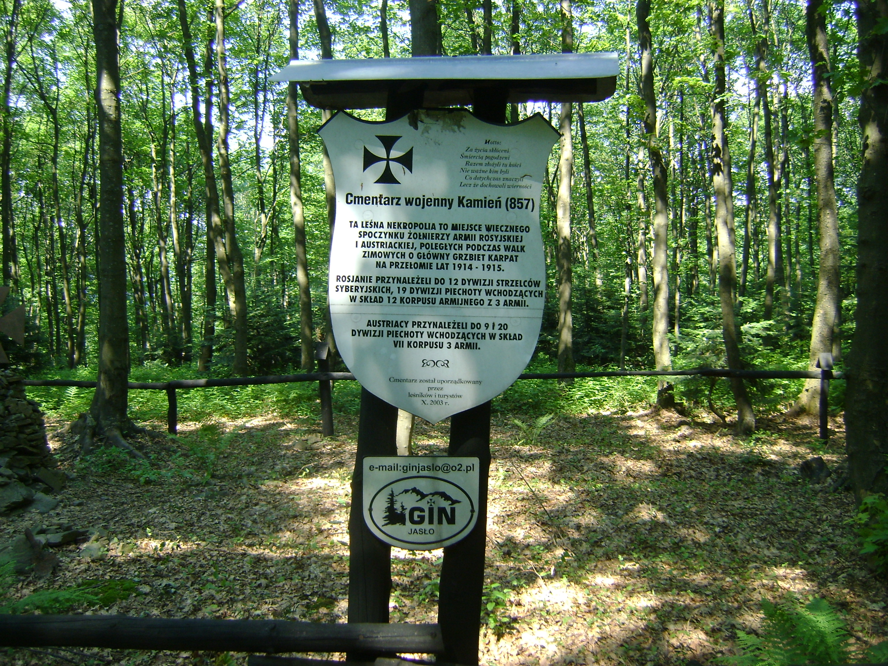 Cmentarz wojenny z okresu I wojny światowejna Kamieniu nad Jaśliskami - w Beskidzie Niskim.